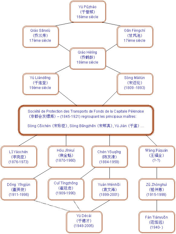 Genealogie de la branche Yu